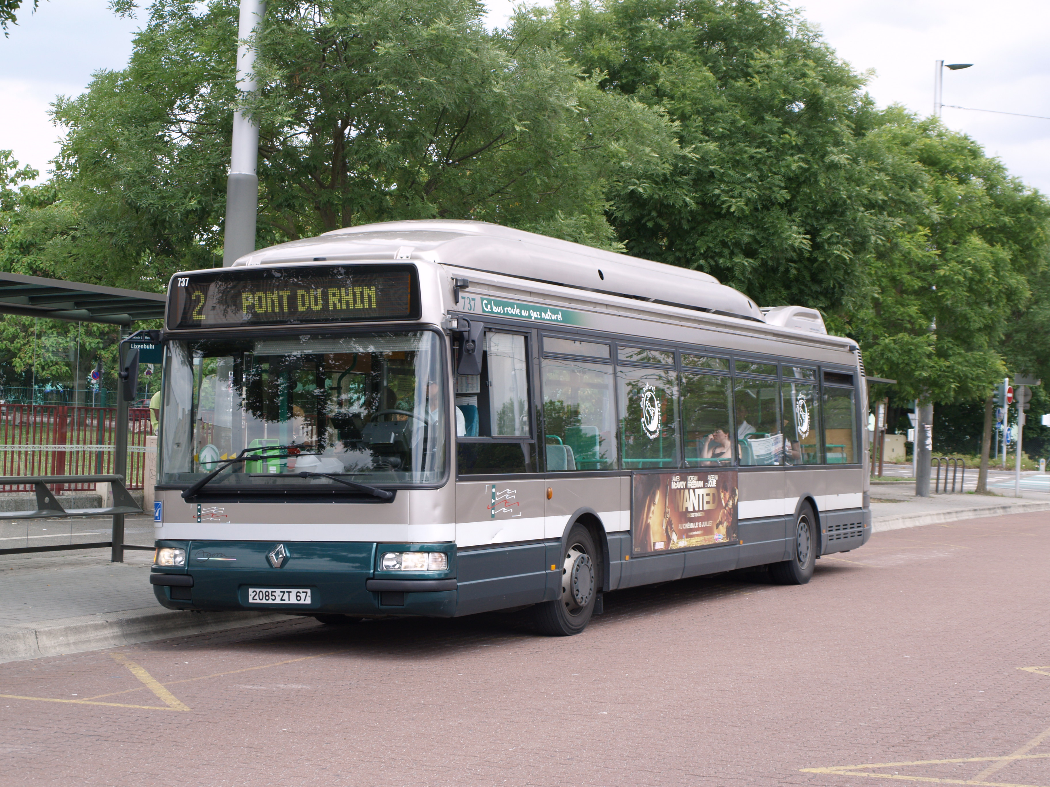 Agora S GNV (Gaz Naturel de Ville) sur la ligne 2 à Illkirch-Graffenstanden (commune périphérique à Strasbourg)